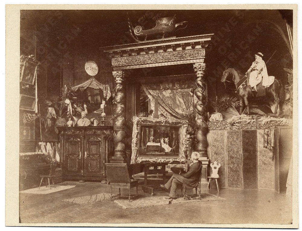 Munkácsy a műtermében